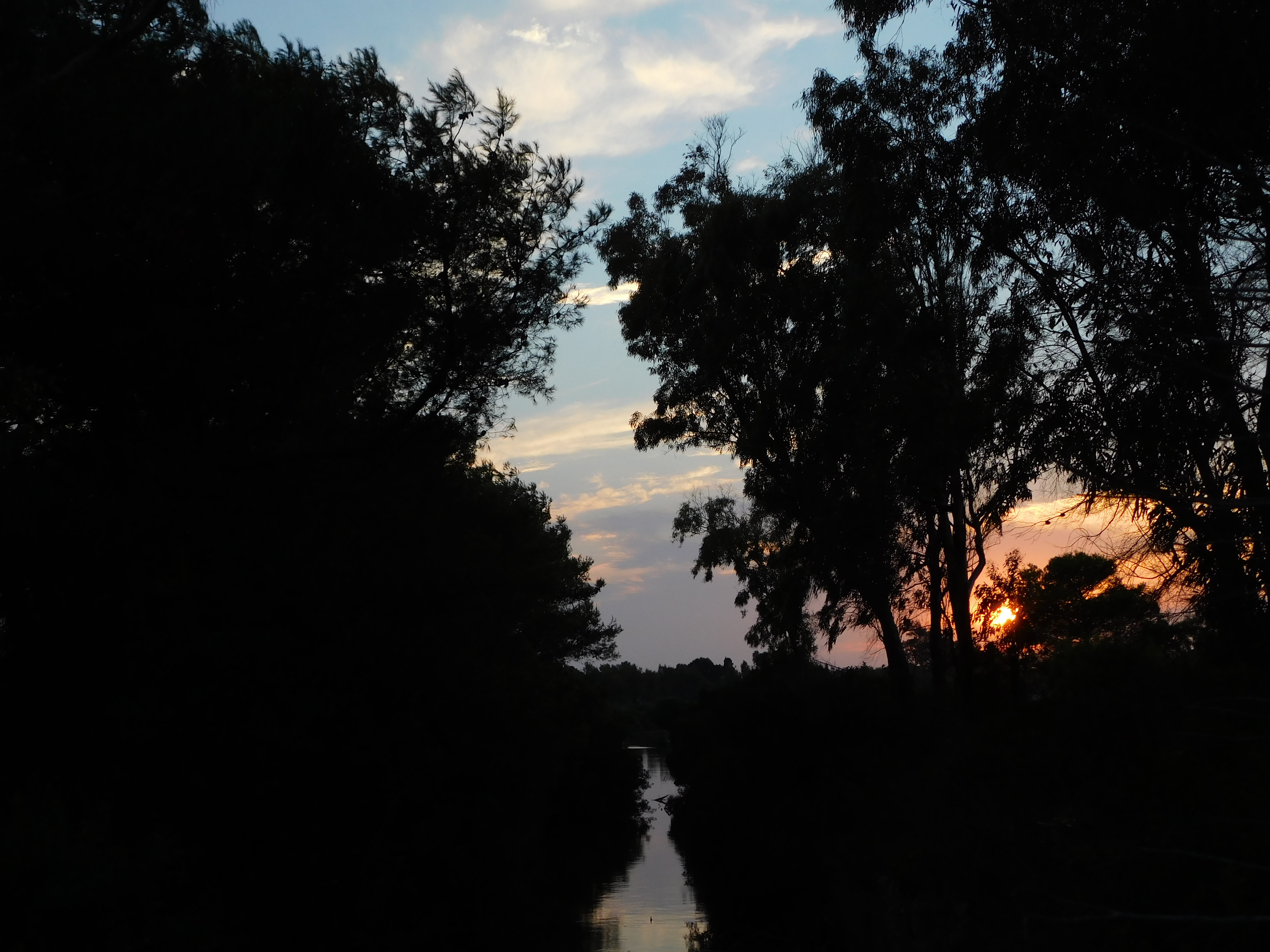 Il canale principale al tramonto